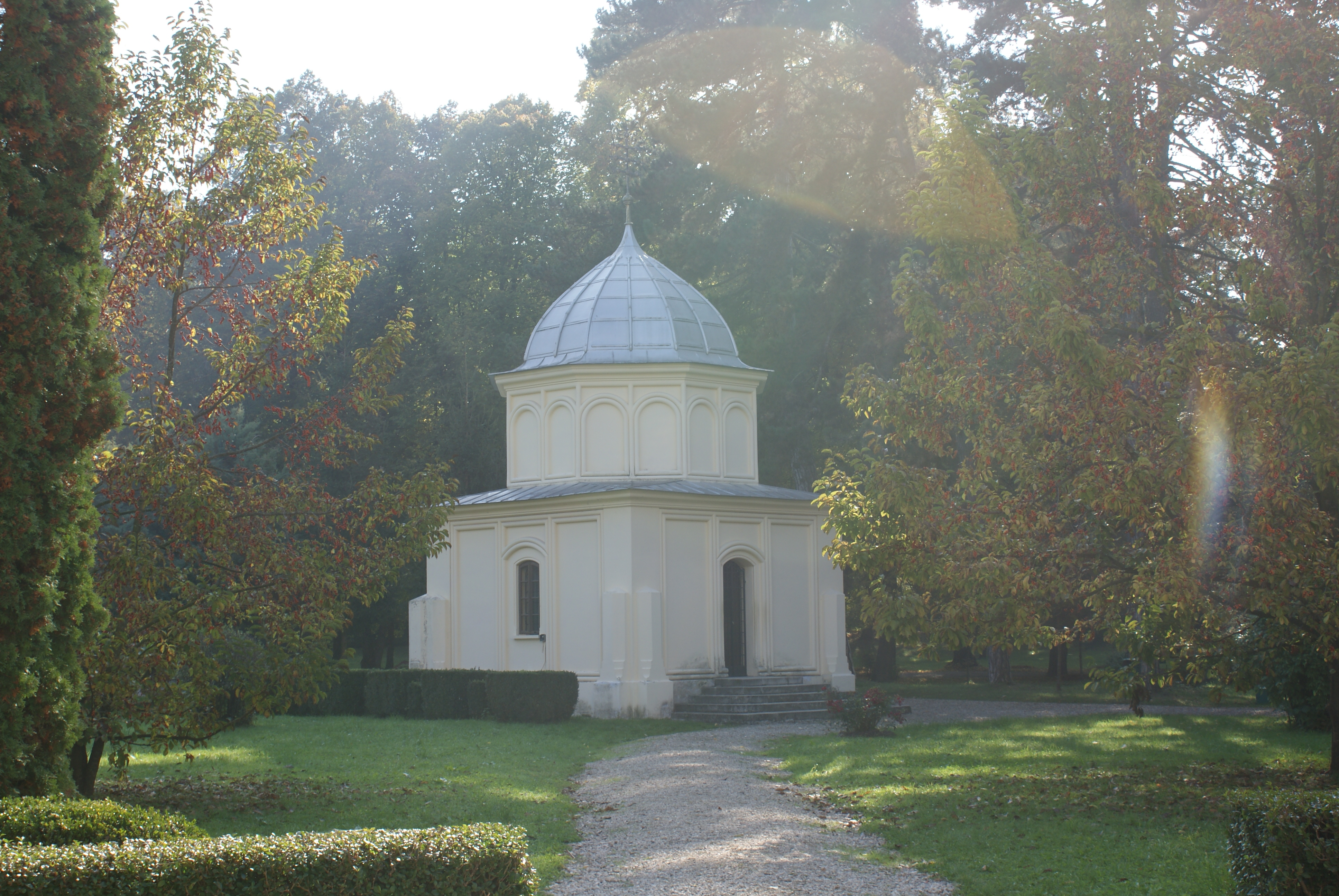 Clădiri anexă 04